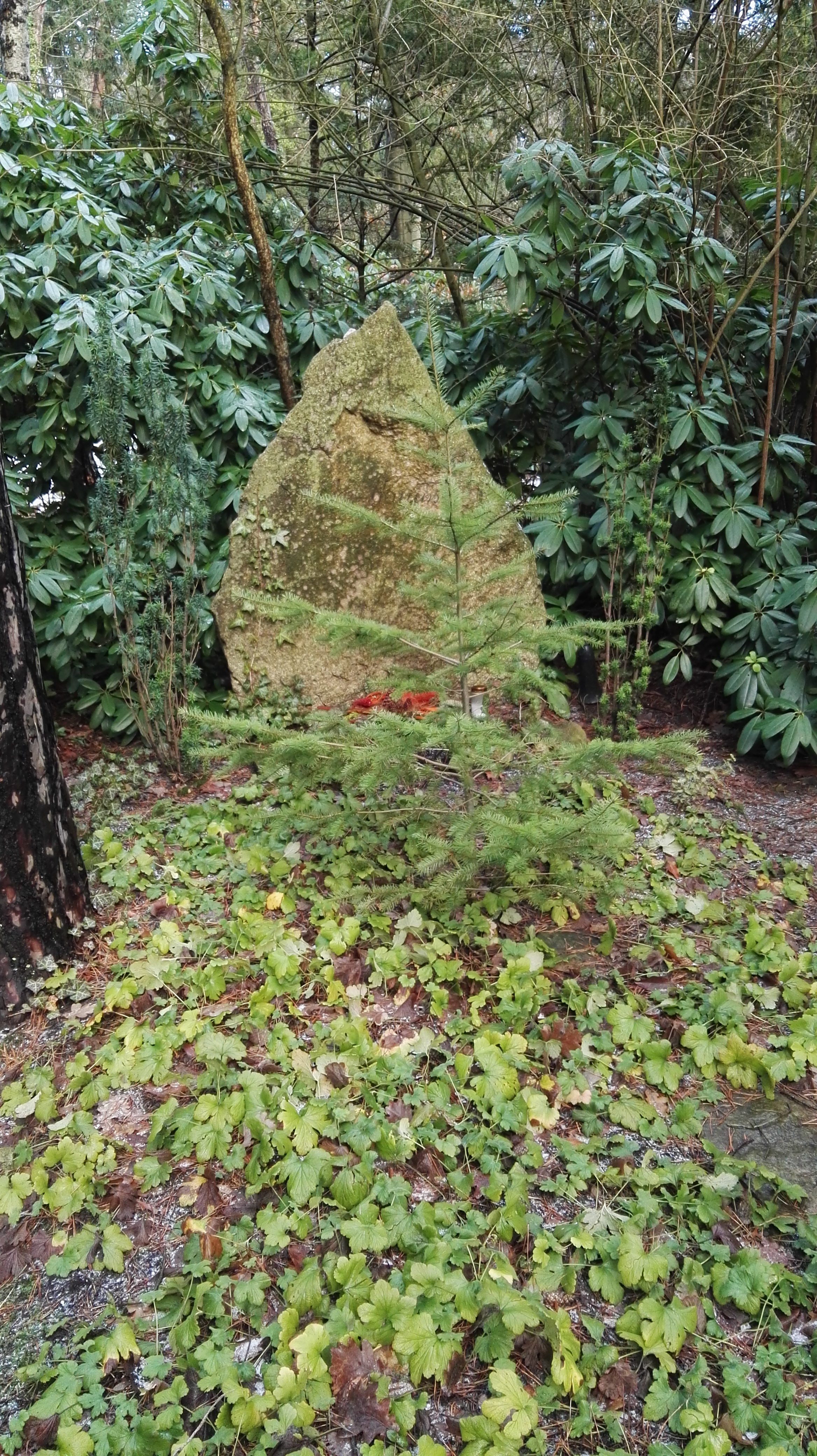 Grab von Erik Jan Hanussen auf dem Südwestkirchhof Stahnsdorf